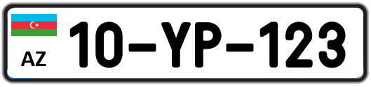 Azərbaycan Respublikası avtomobil dövlət qeydiyyat nişanı Yol Polisi